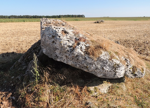 Dolmens de Membrolles. Celui du haut au premier plan semble effondré sur ses orthostats plus verticaux eux-mêmes et sa table blanche est allée au sol sur la droite. Le second peut-être à 100m est moins facile à voir mais pas de grandes dimensions non plus. Autre champs puis bois à l'horizon